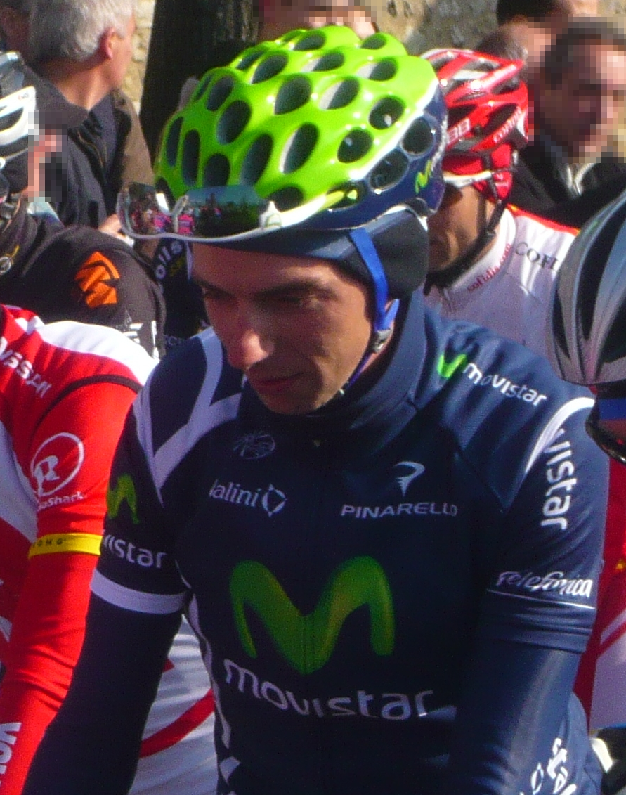 Xavier Tondo à Paris-Nice 2011